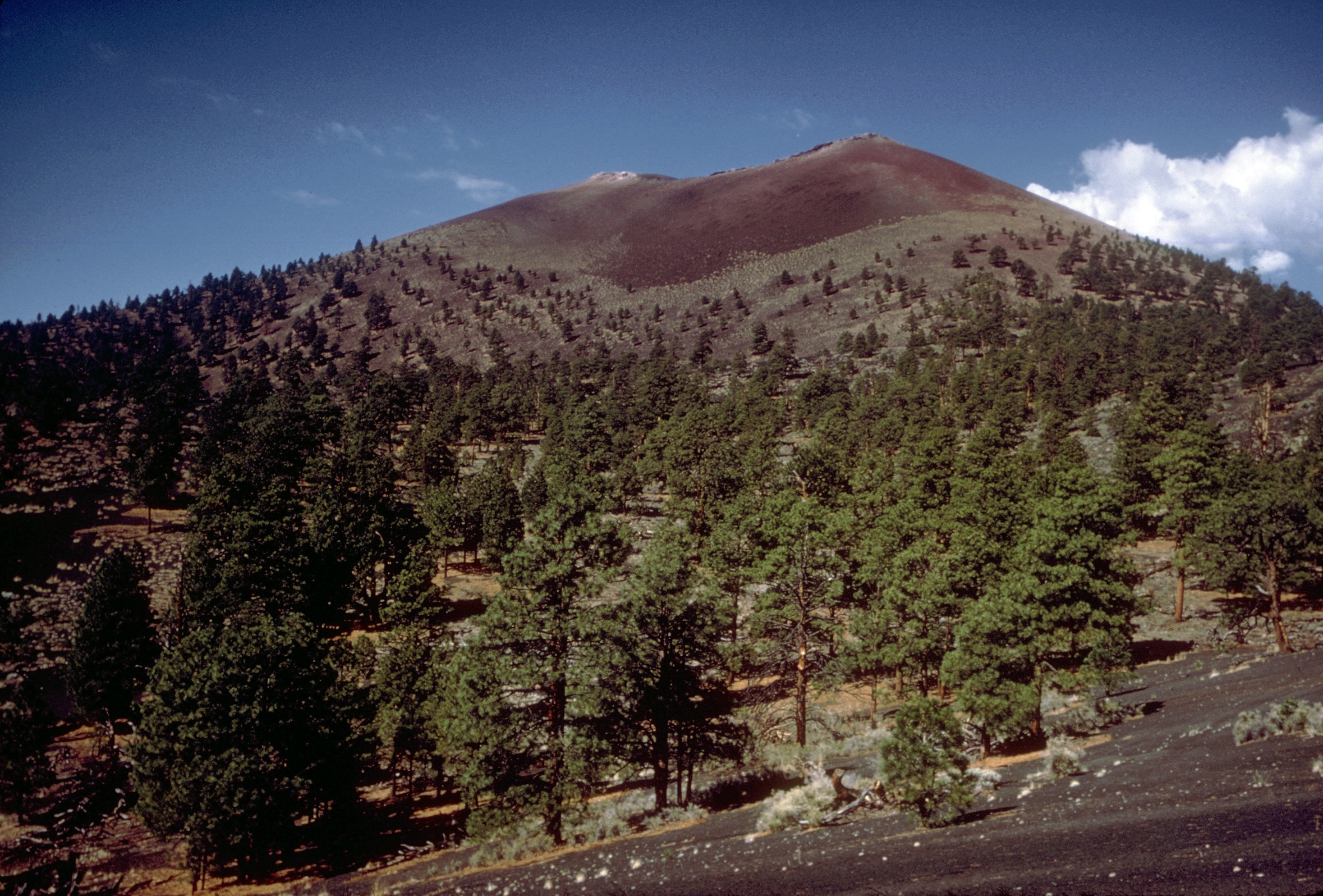 Sunset Crate National Monument, Arizona, USA. Cinder cone.